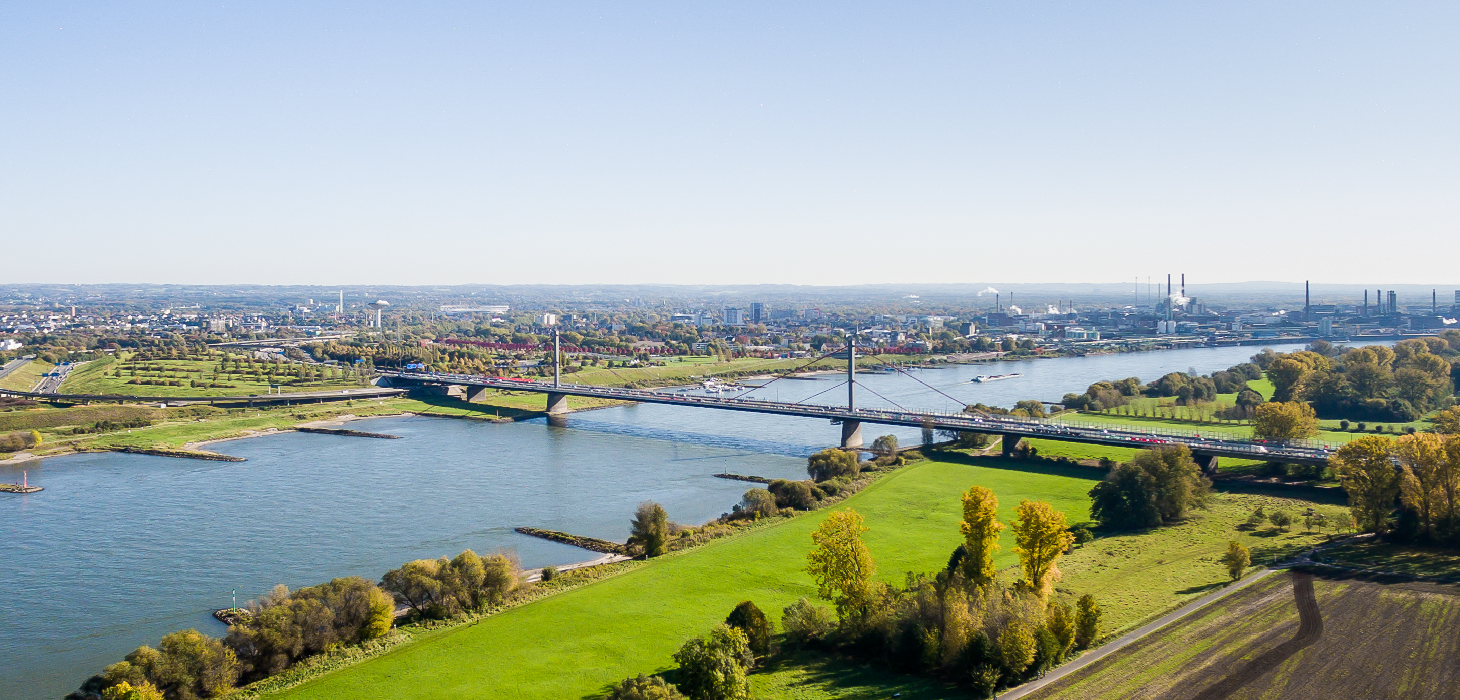 Rheinbrücke Leverkusen, Blick von Rheinkassel, Köln